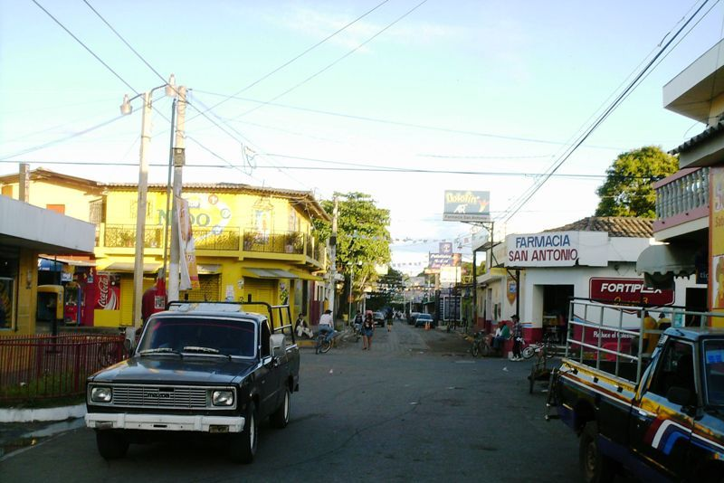 Calle principal de El Transito.